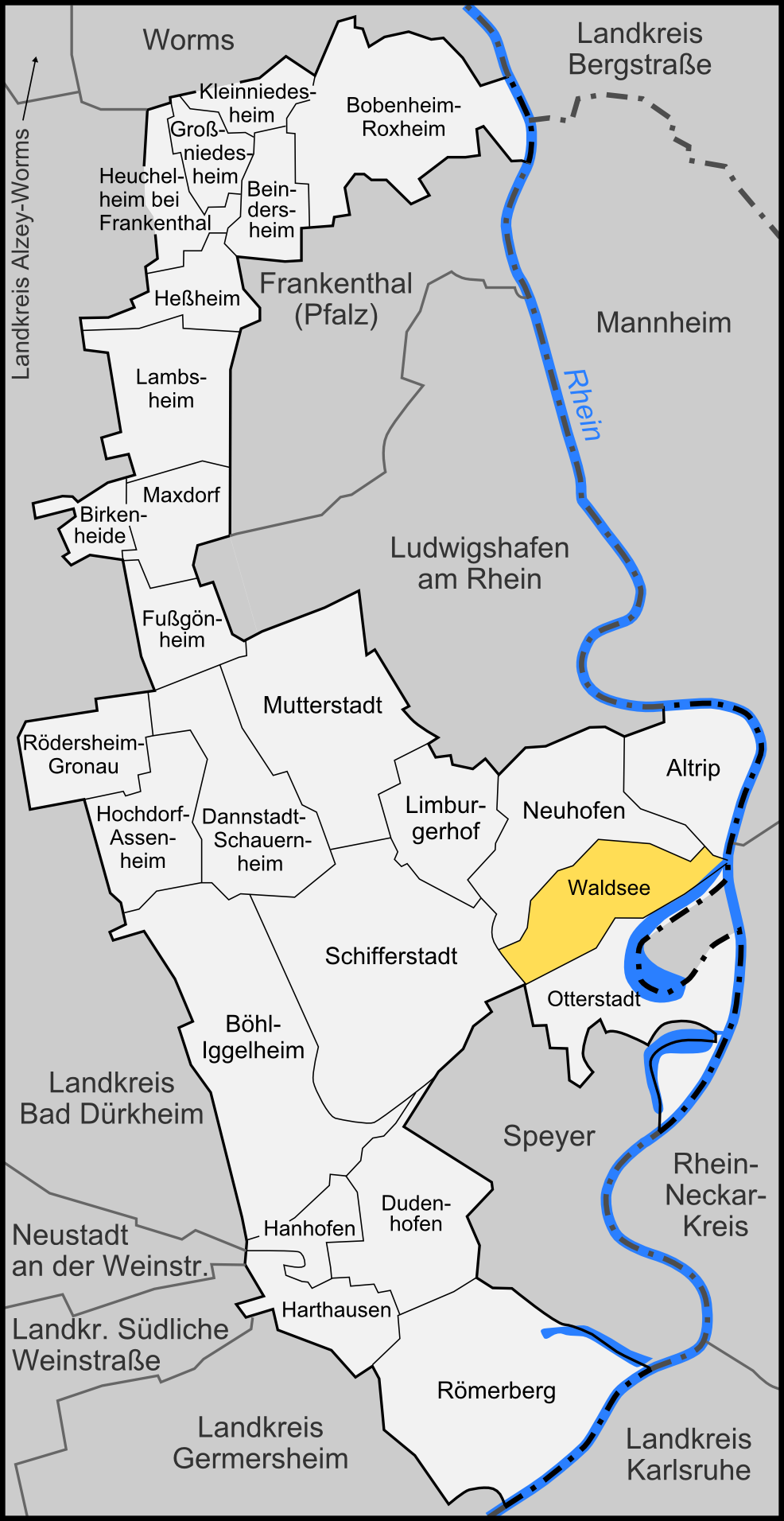 Karte der Gemeinde Waldsee im Rhein-Pfalz-Kreis